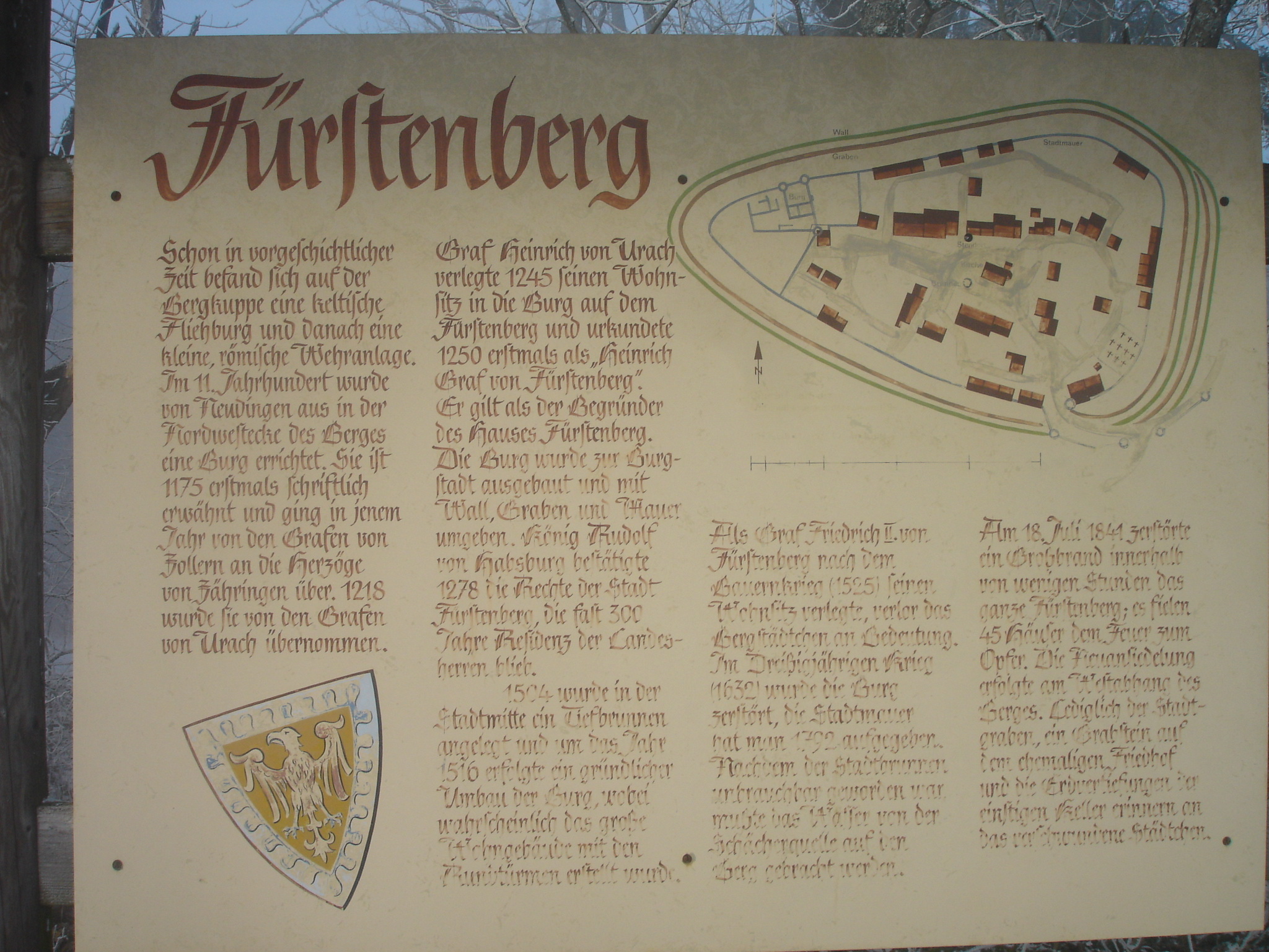 Hinweistafel auf die Burg Fürstenberg auf dem Fürstenberg (Baar)